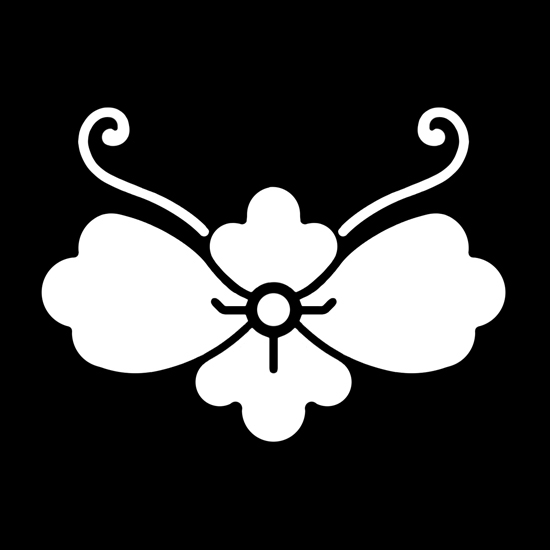 「蝶花菱」紋（染抜）